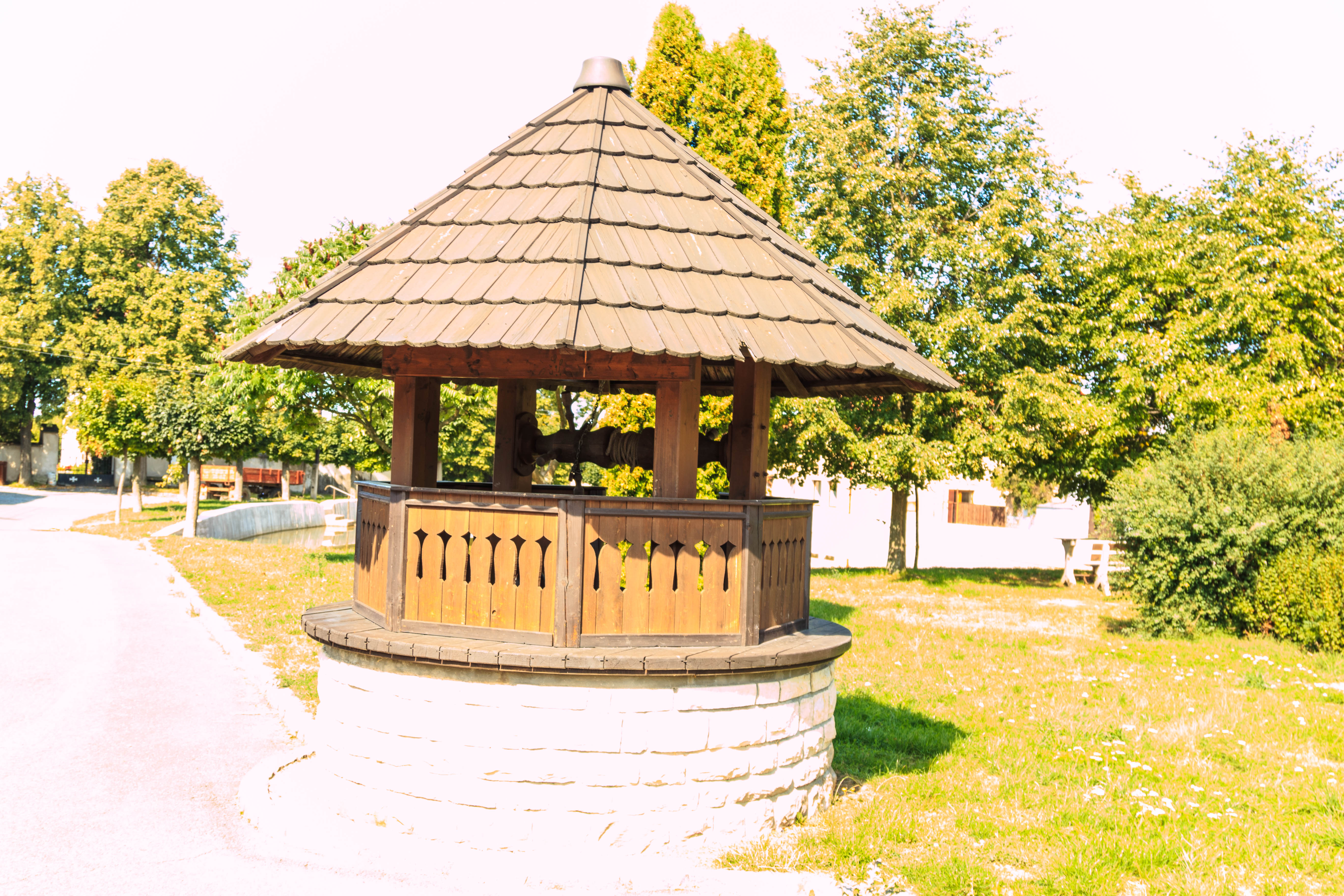 Štěpánov u Skutče studna